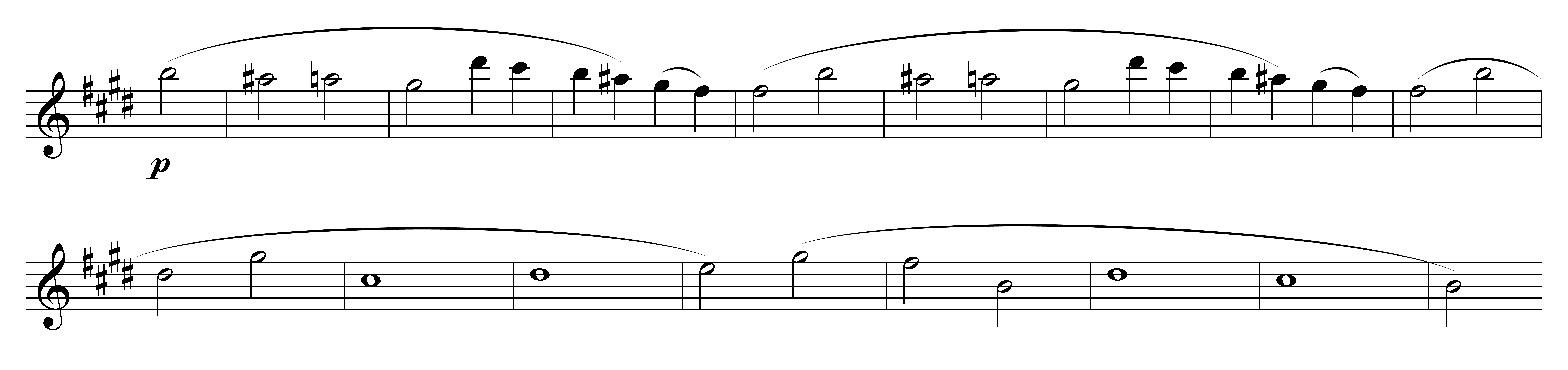 Notenbeispiel Mendelssohn Sommernachtstraum - Choralthema T. 138-154